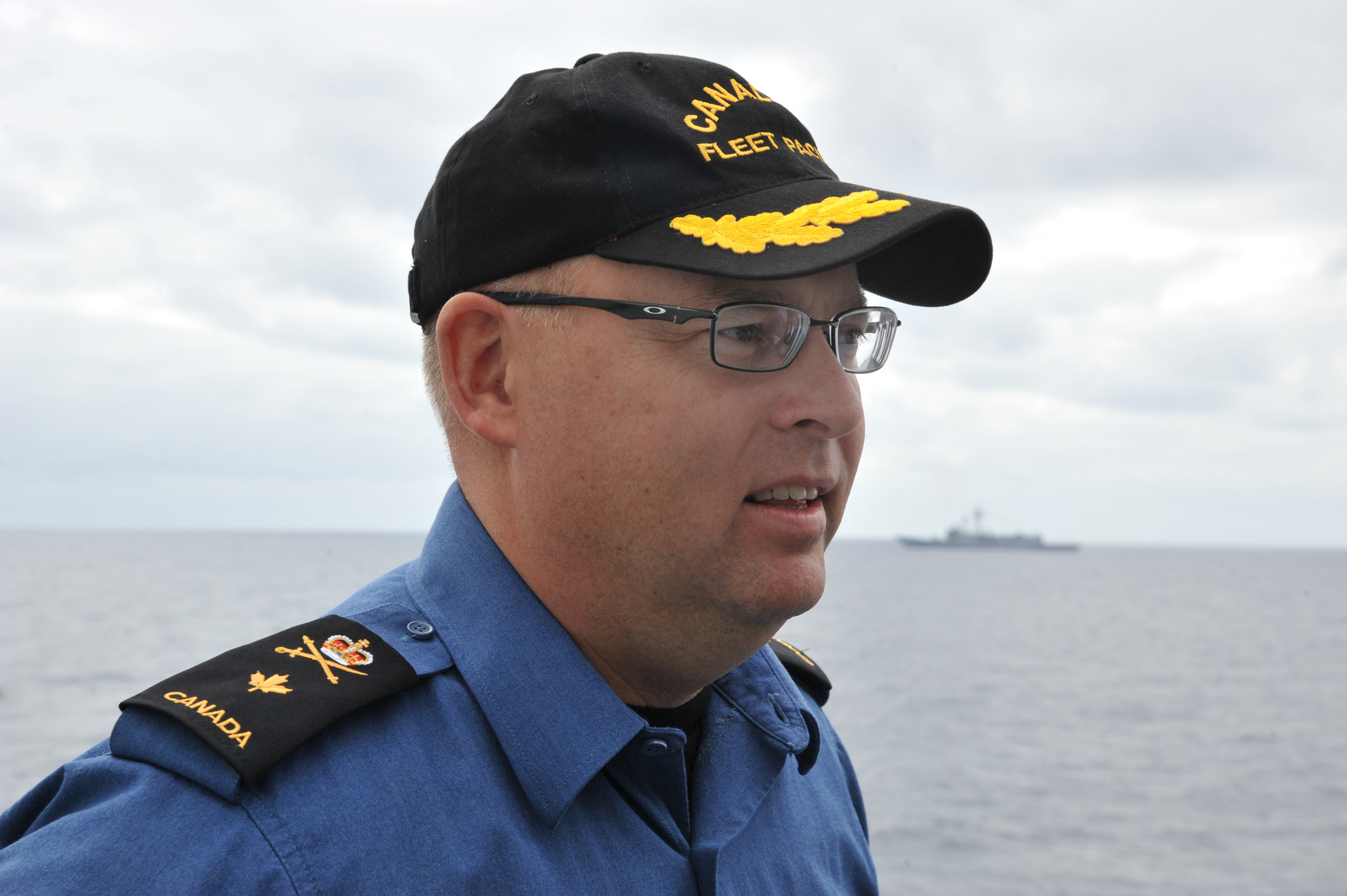 Commodore Bob Auchterlonie